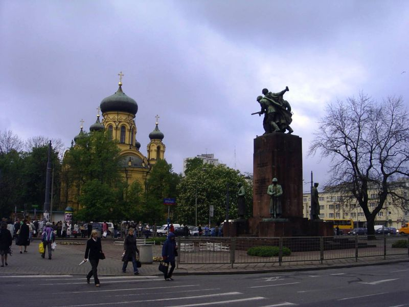 Pomnik Braterstwa Broni (Warsaw; Poland)